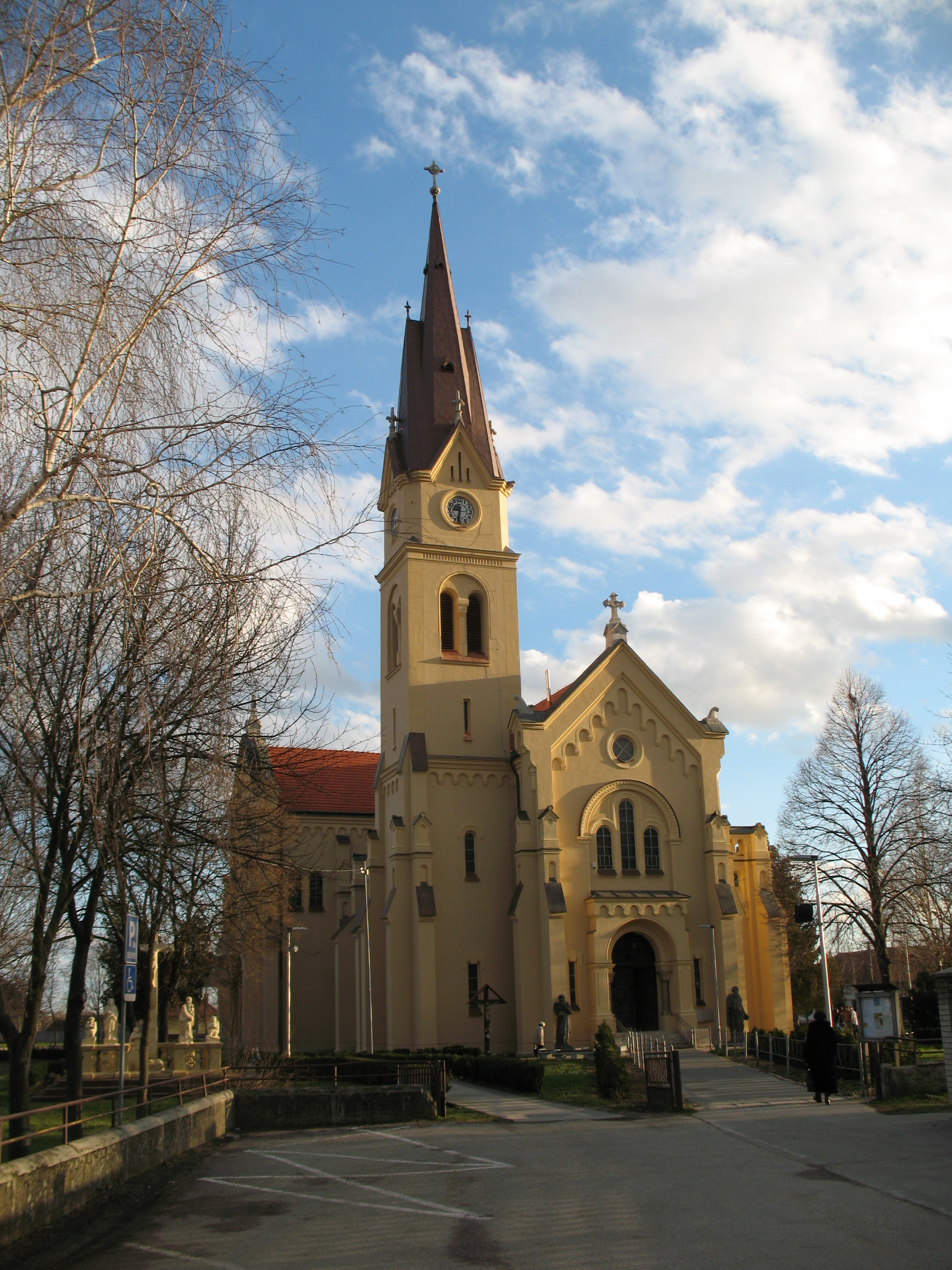 Verebély templom